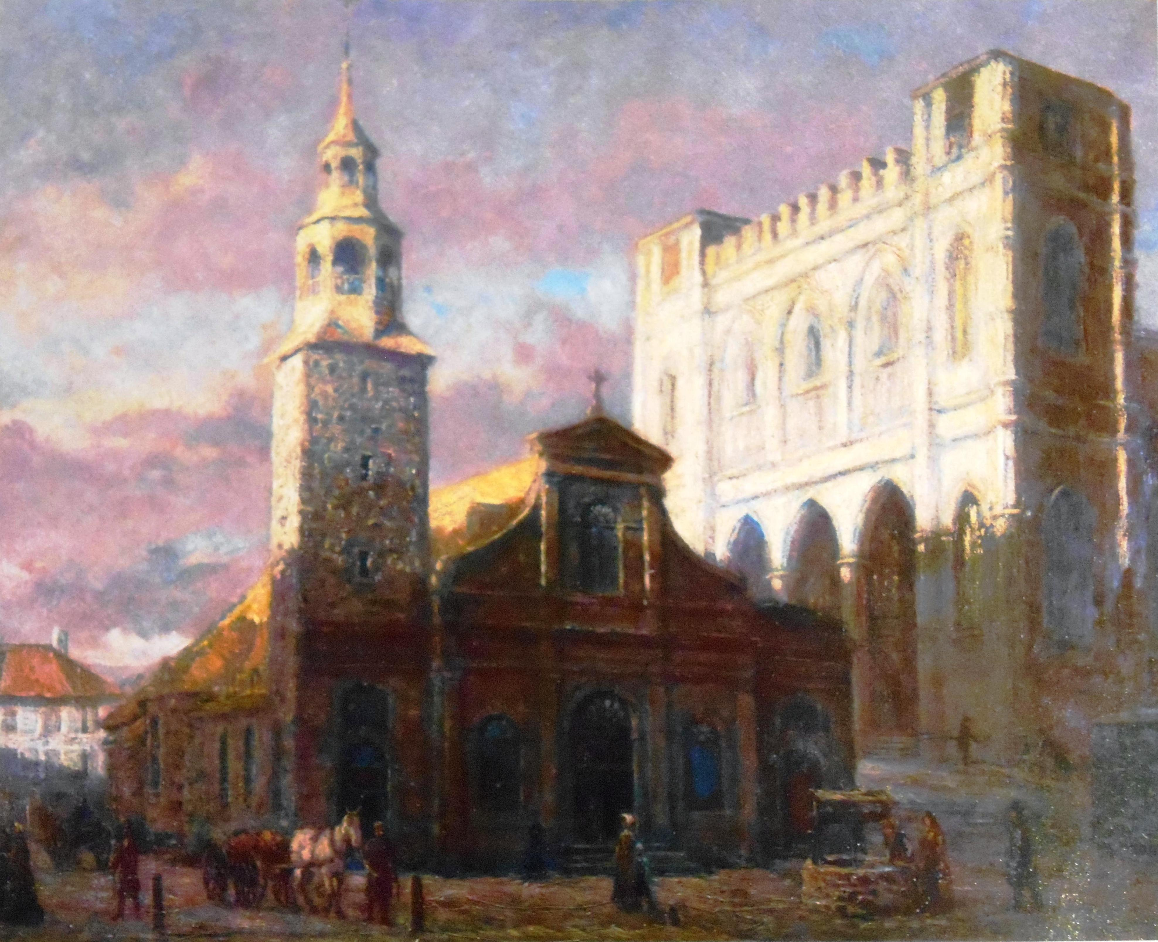 La première église Notre-Dame juste avant sa démolition. À l'avant-plan, l'un des puits de Ville-Marie.